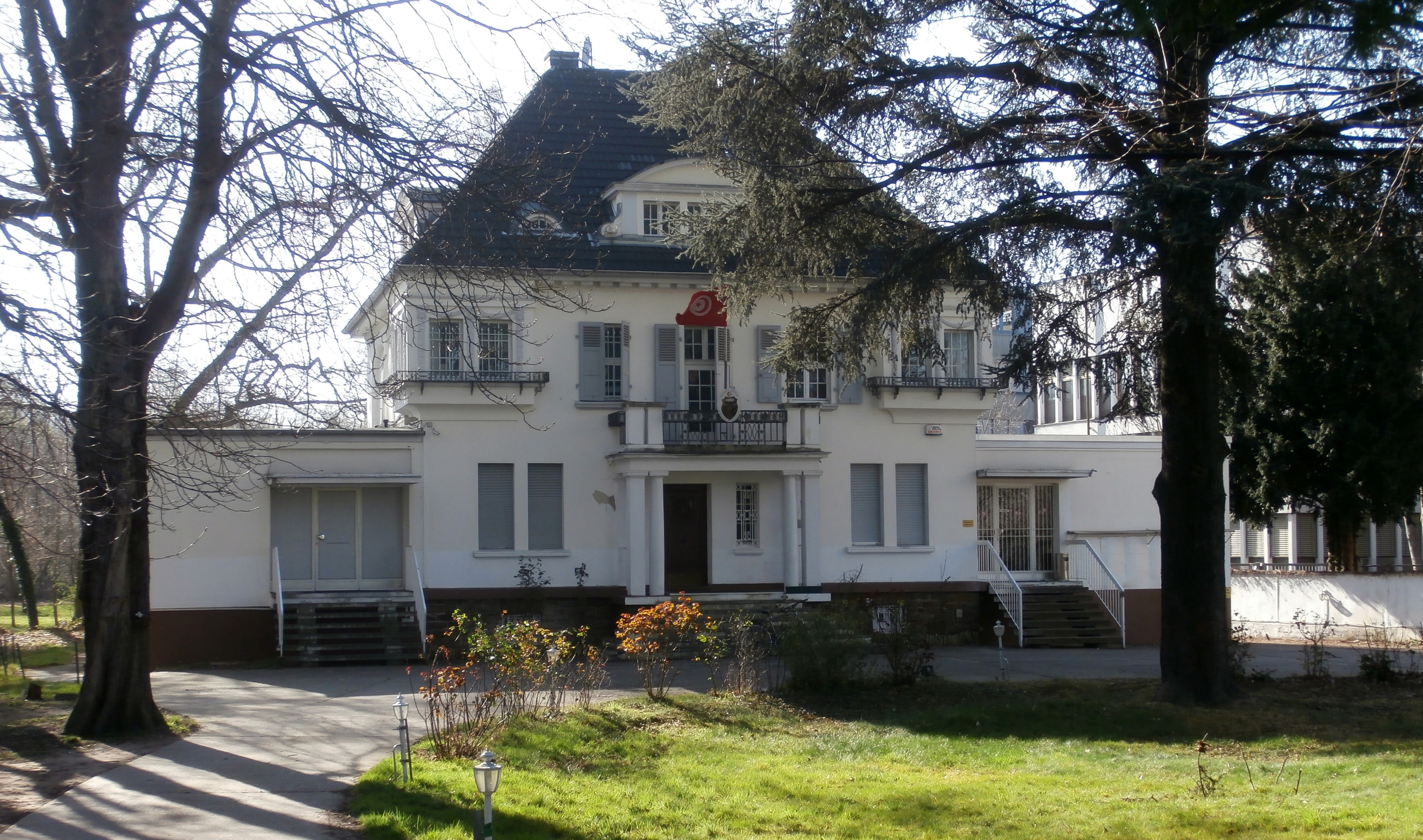 Generalkonsulat und ehemaliges Kanzleigebäude der Botschaft von Tunesien, Godesberger Allee 101–103, Friesdorf, Bad Godesberg